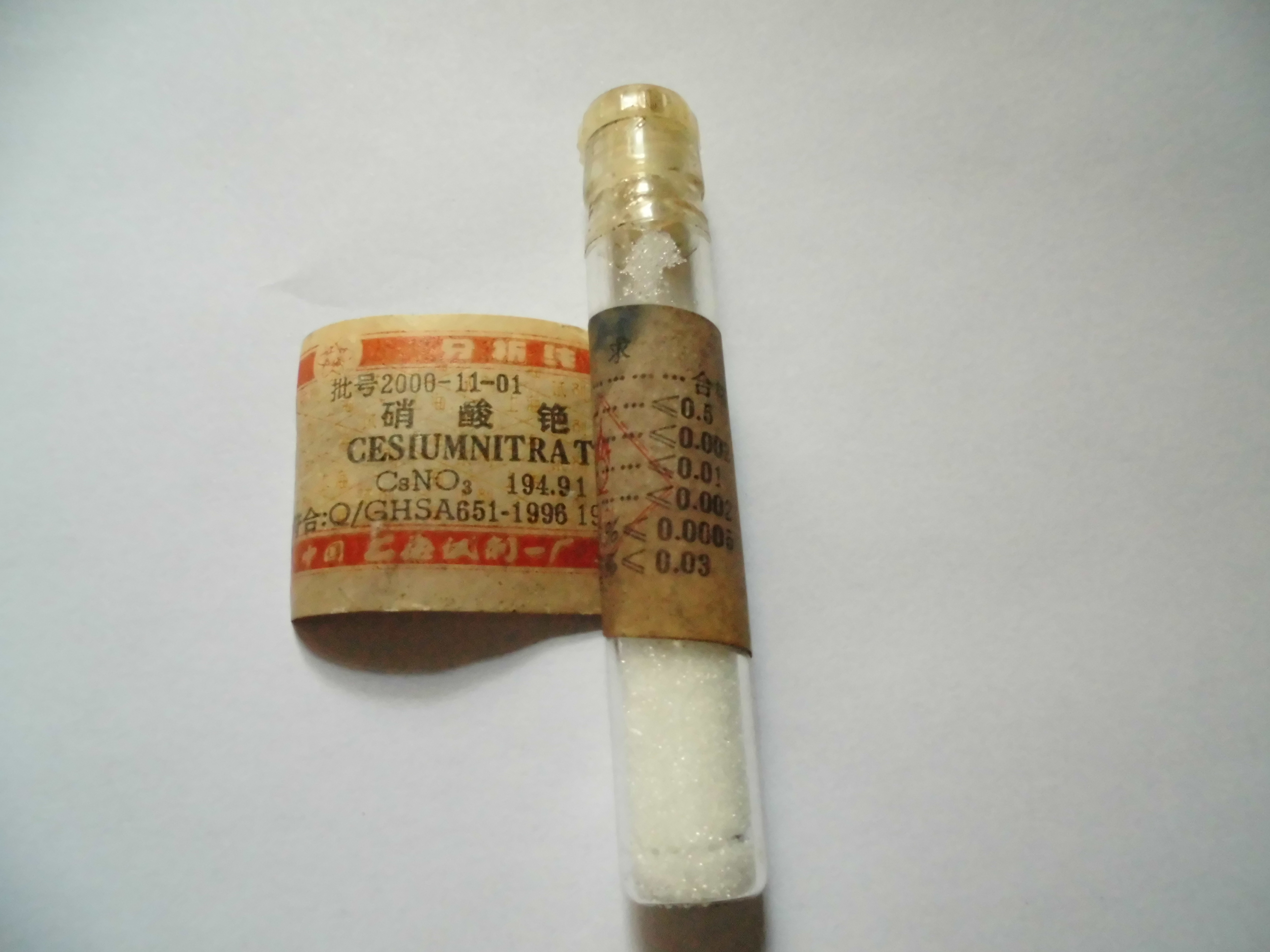 硝酸铯，AR，5克